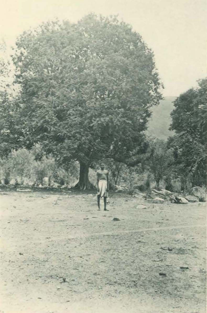 Tamarindenbaum (Tamarindus indica L.) am Ruhuhu